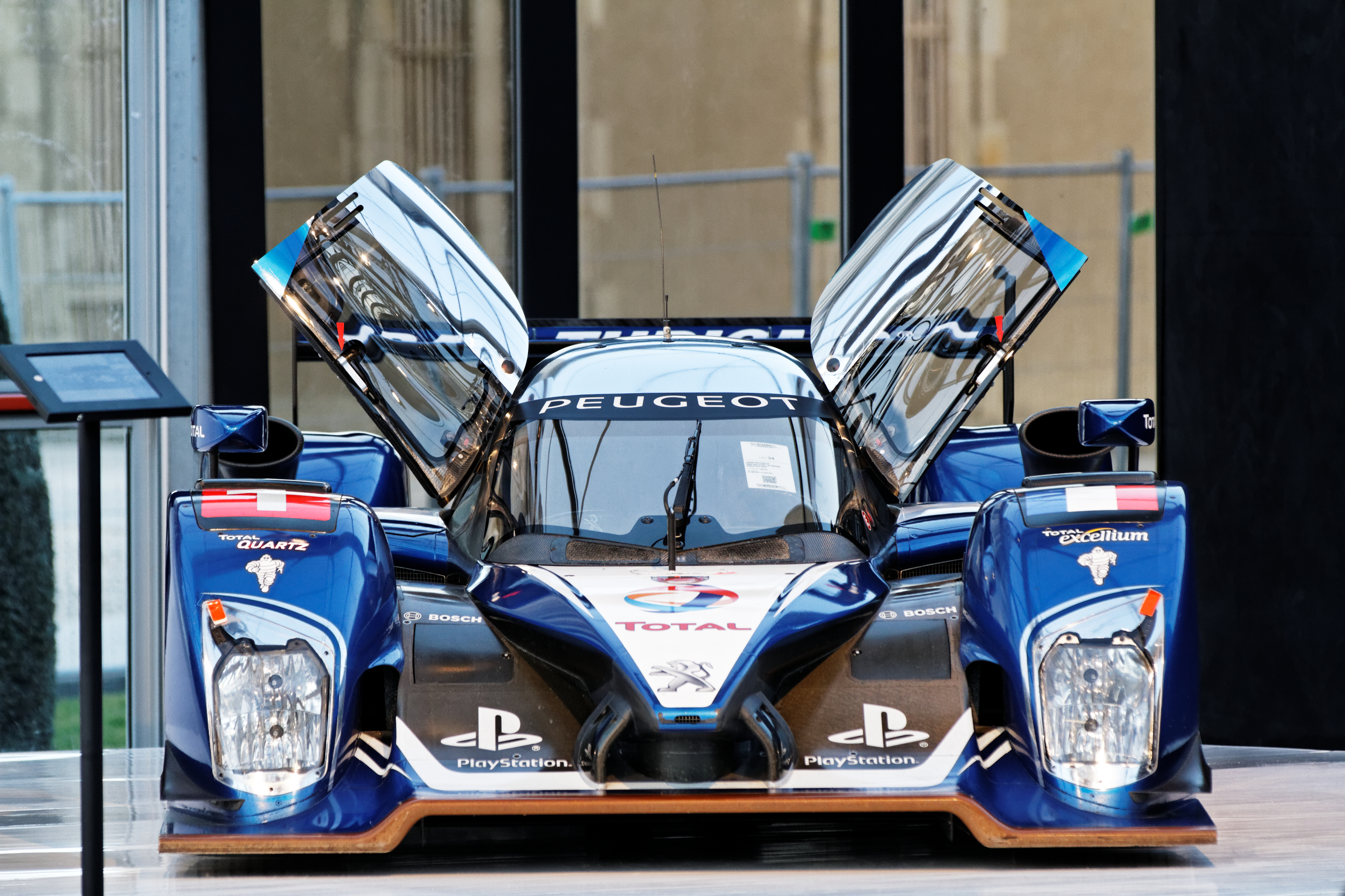 Une Peugeot 908 HDI FAP Le Mans prototype de 2008.